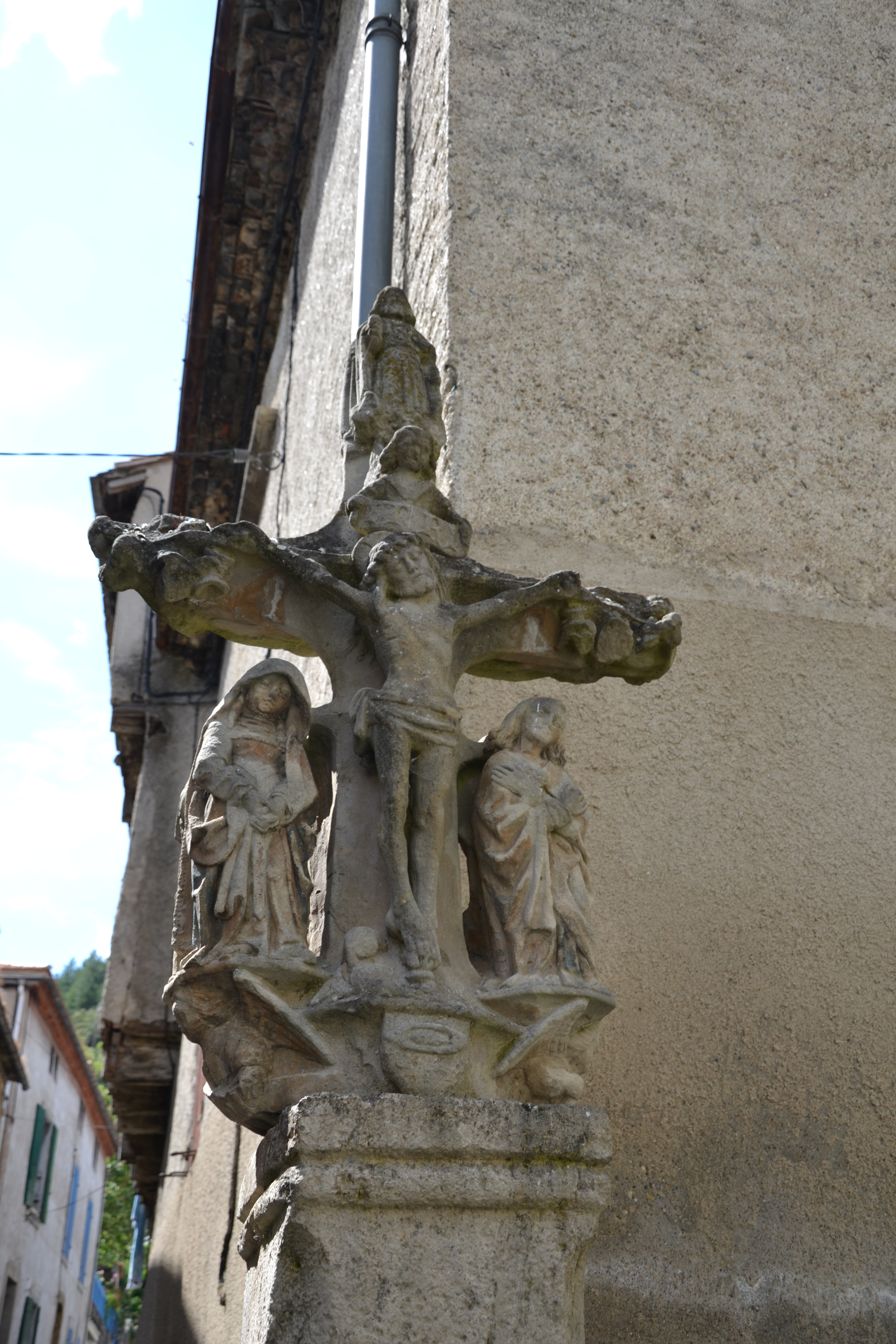 croix des tisserands - recto